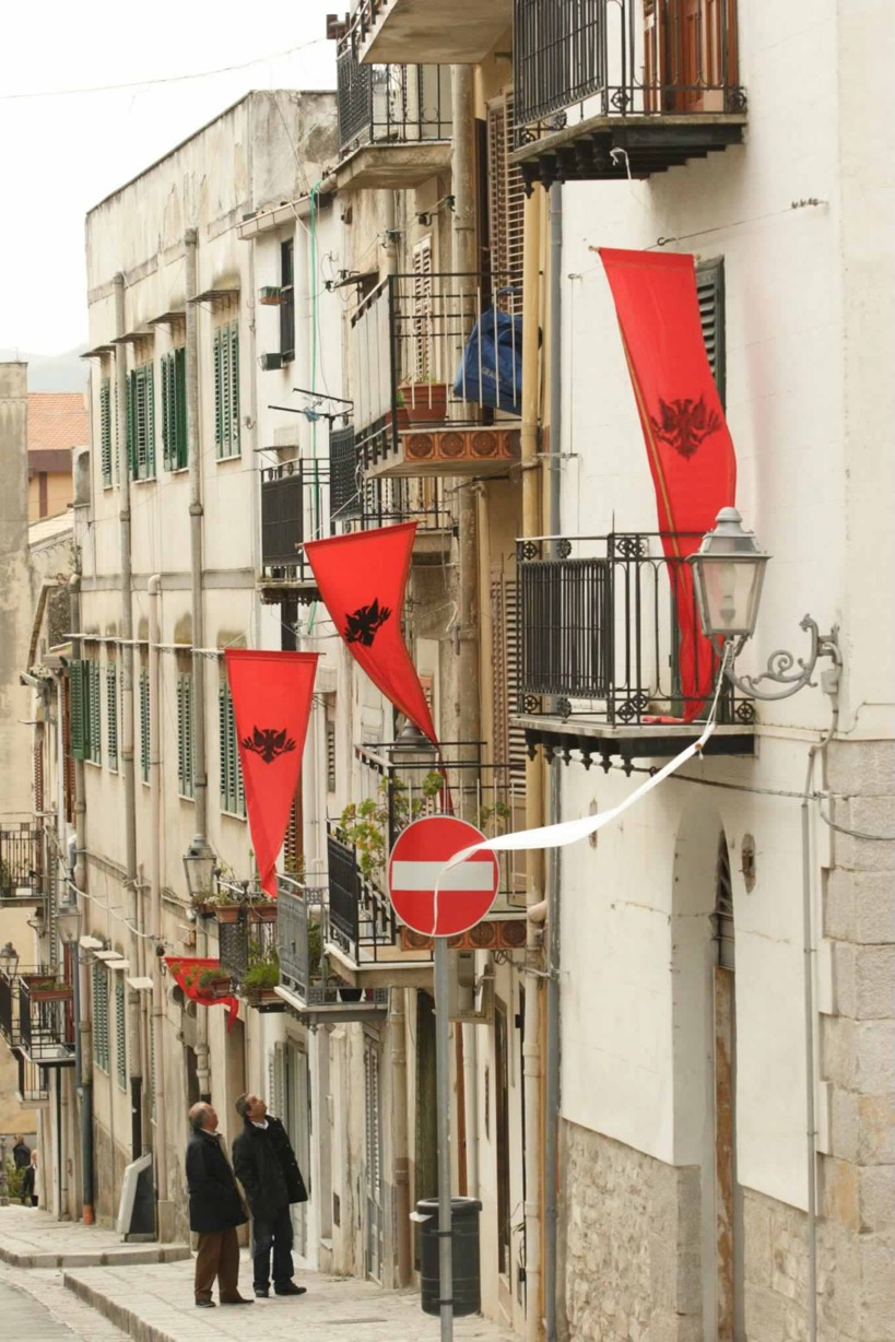 Foto di Fatos Vogli. Pasqua a Piana degli Albanesi.